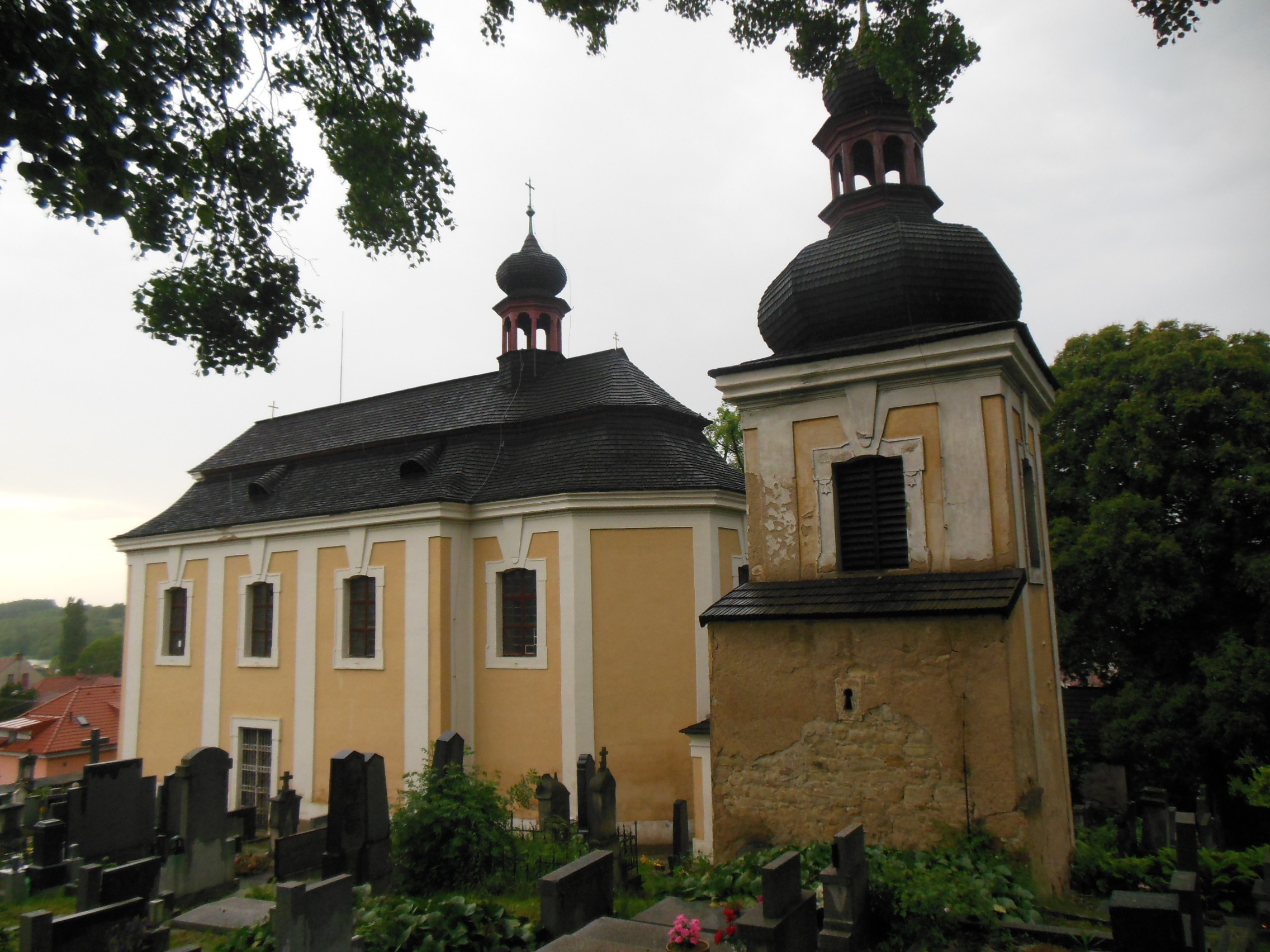 Kralupy nad Vltavou-Zeměchy (okres Mělník). Zvonice u kostela Narození svatého Jana Křtitele, pohled od jihovýchodu.